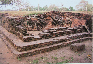 พระที่นั่งจักรวรรดิ์ไพชยนต์